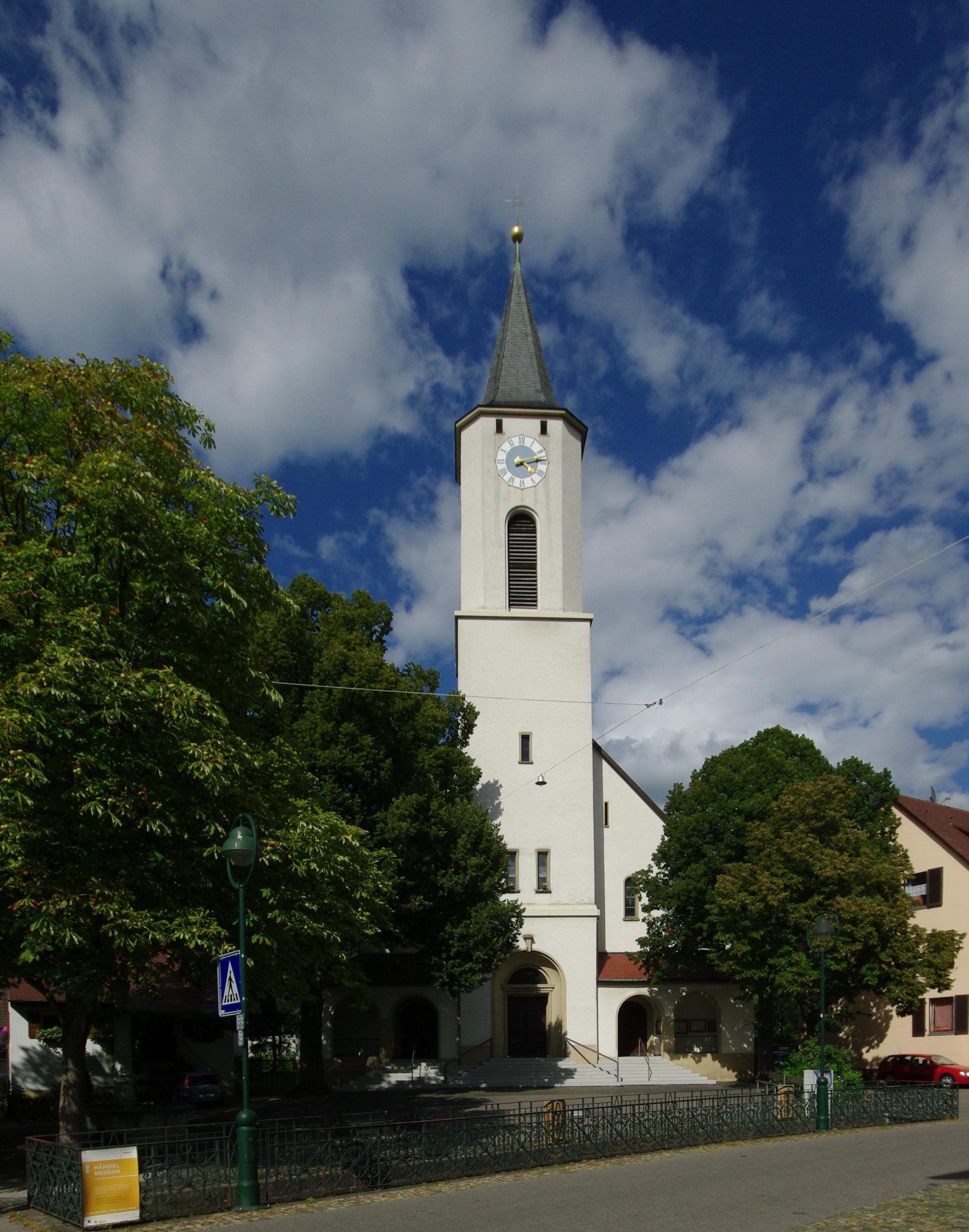 St._Urban